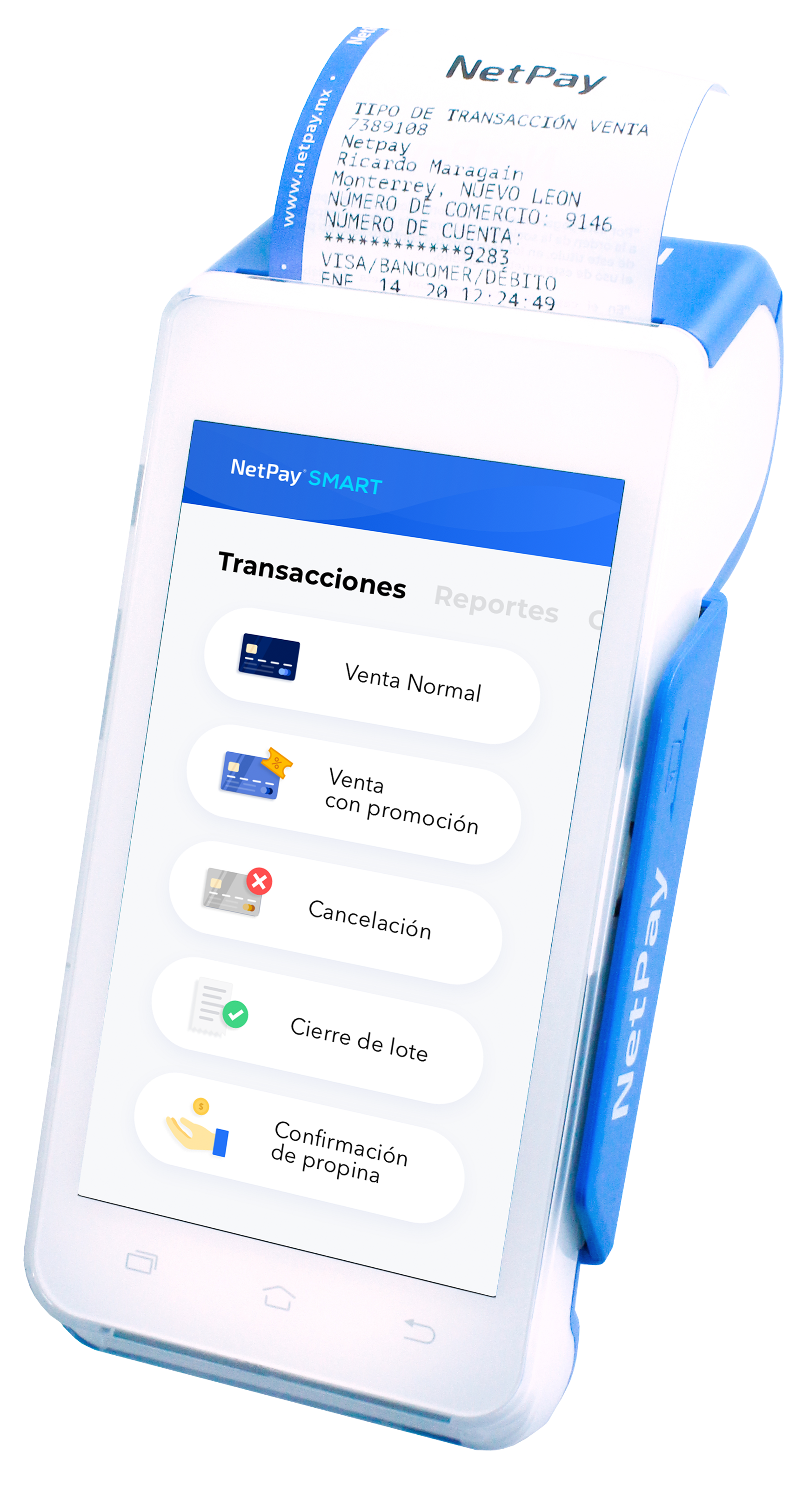 Terminal punto de venta TPV inteligente, permite aceptar pagos con tarjeta de crédito y débito ademas de contar con apps especialmente diseñadas para los comercios.